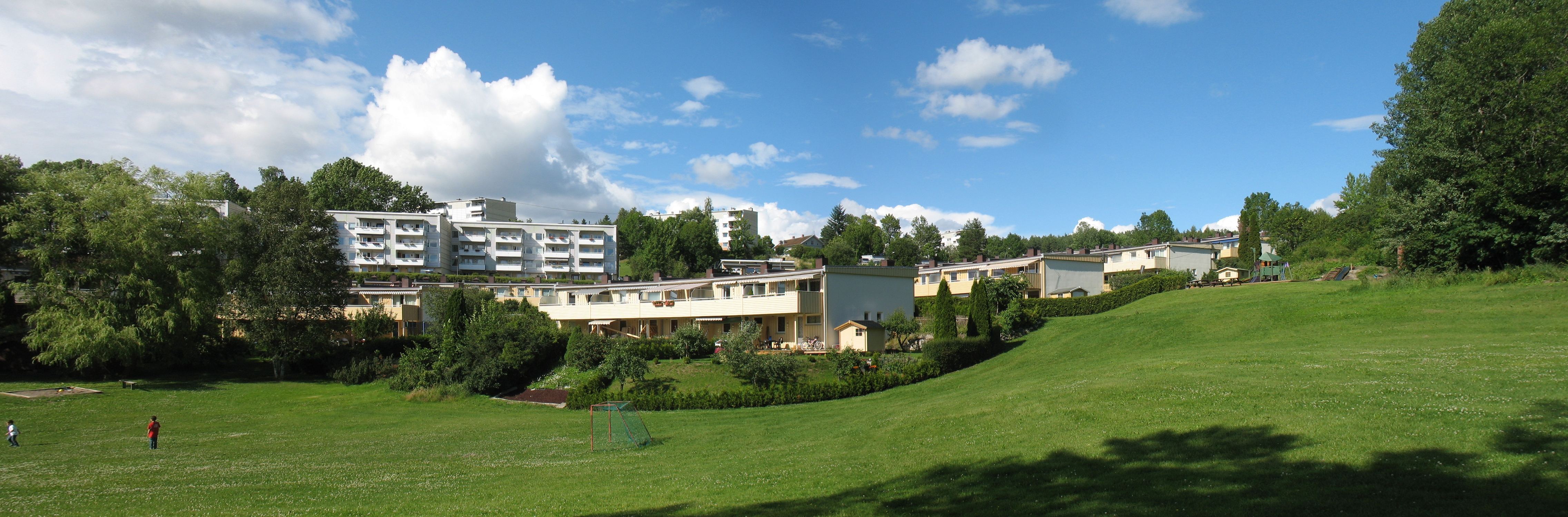 Rekkehusene i Welding Olsens vei på Rustad/Bogerud i Oslo.